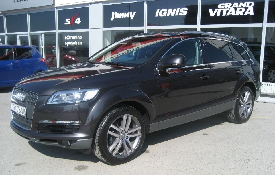 Audi Q7